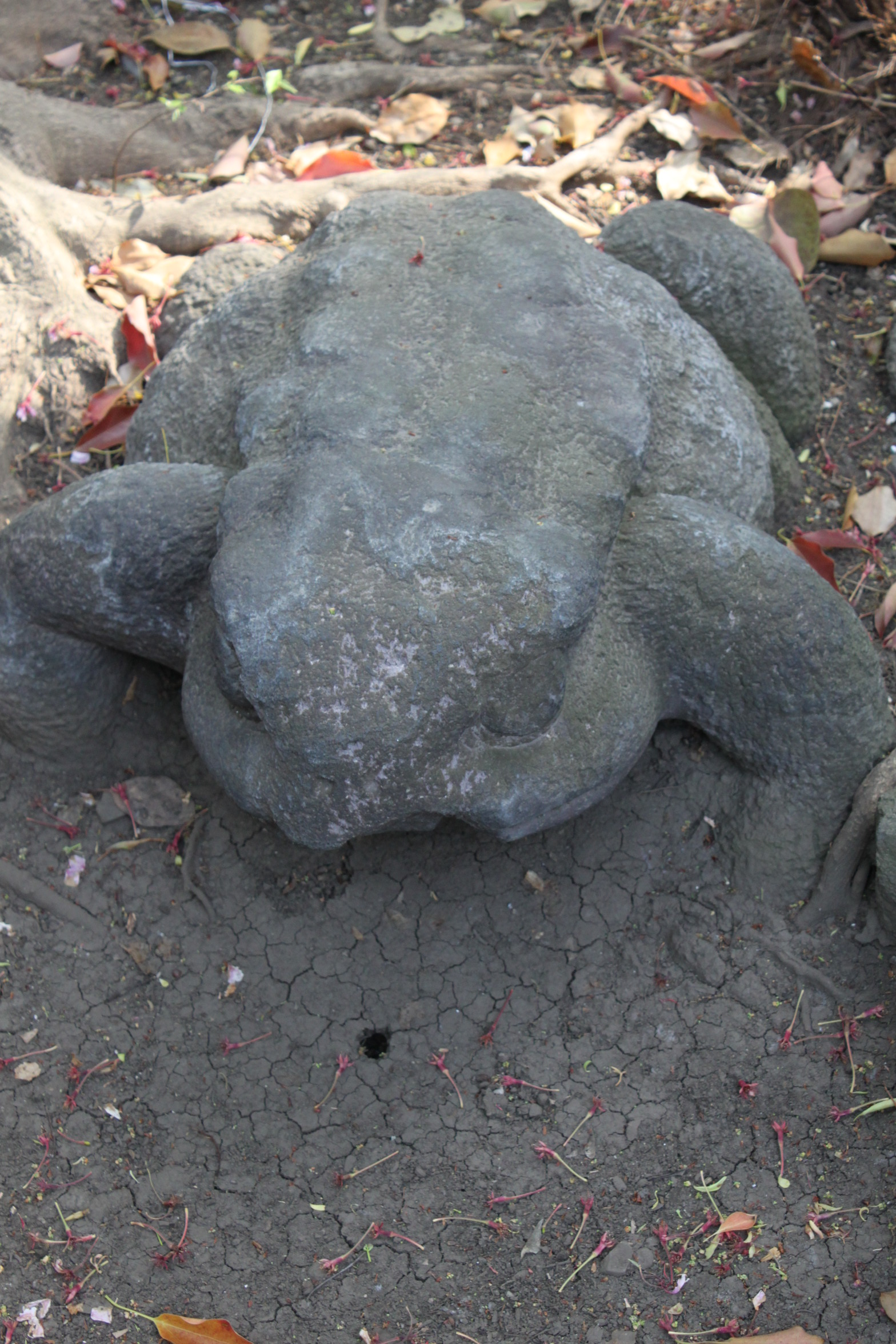 宝珠院大蛙